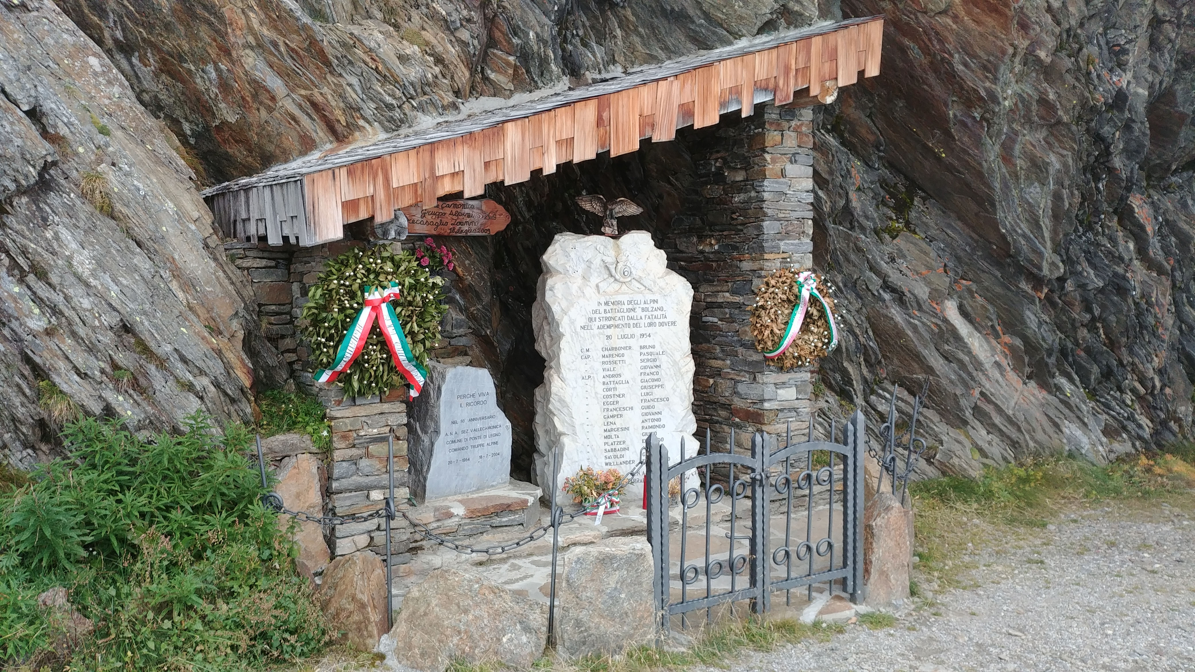 La lapide in ricordo degli Alpini deceduti nell'incidente del 1954 sulla strada del Passo Gavia